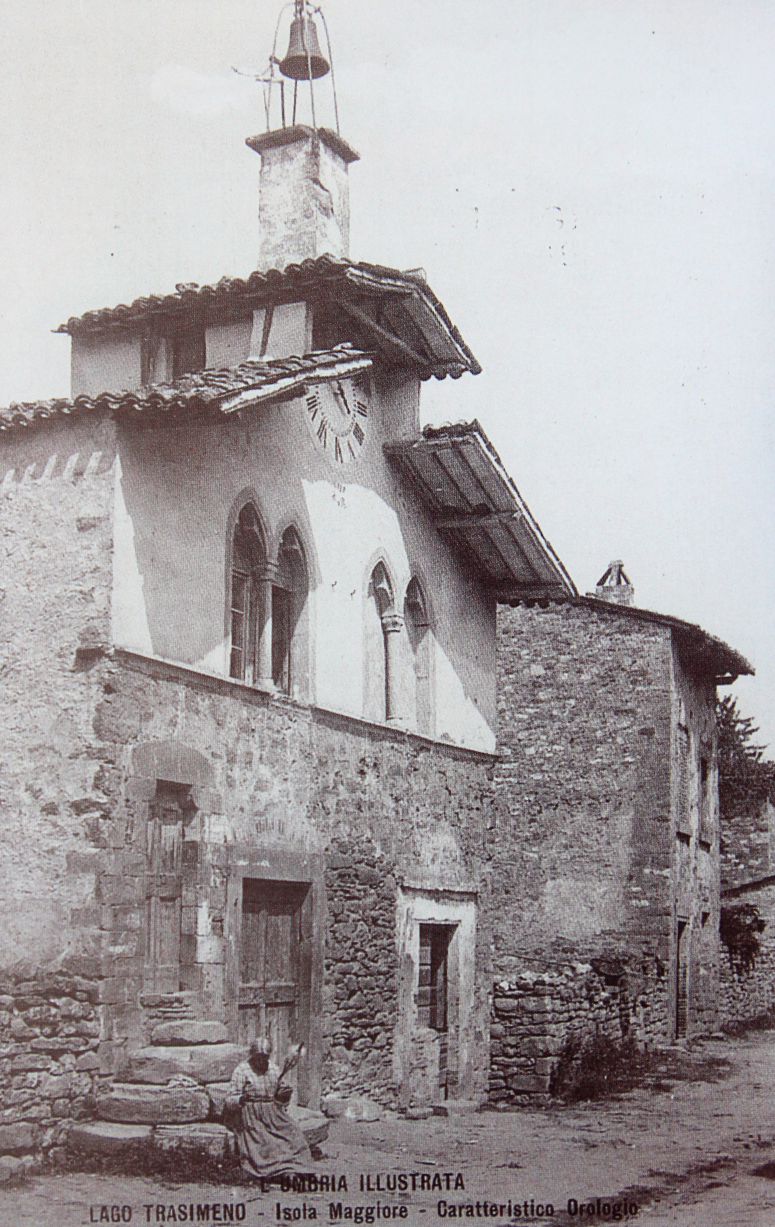 Isola Maggiore